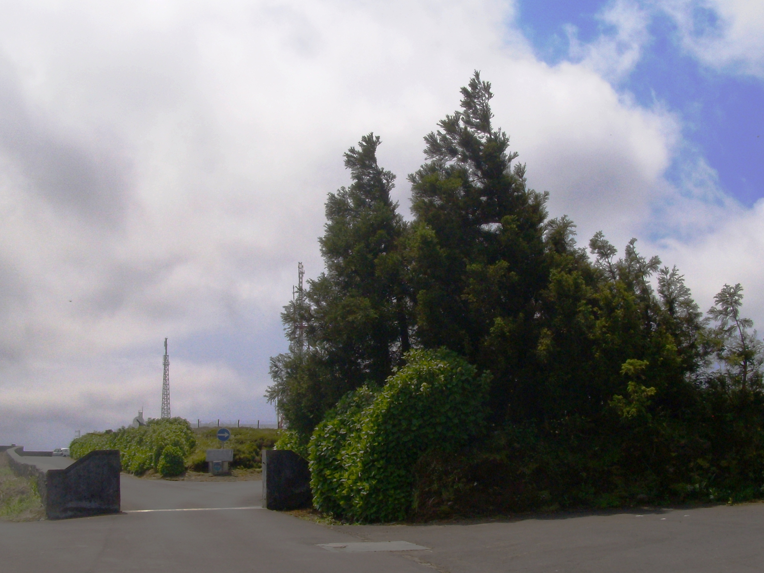 Serra do Cume, Praia da Vitória, ilha Terceira, Açores: acesso ao perímetro das Casamatas da Serra do Cume, onde hoje também se encontra o Miradouro da Serra do Cume.